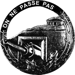 Insigne général des Troupes de Forteresse de la Ligne Maginot